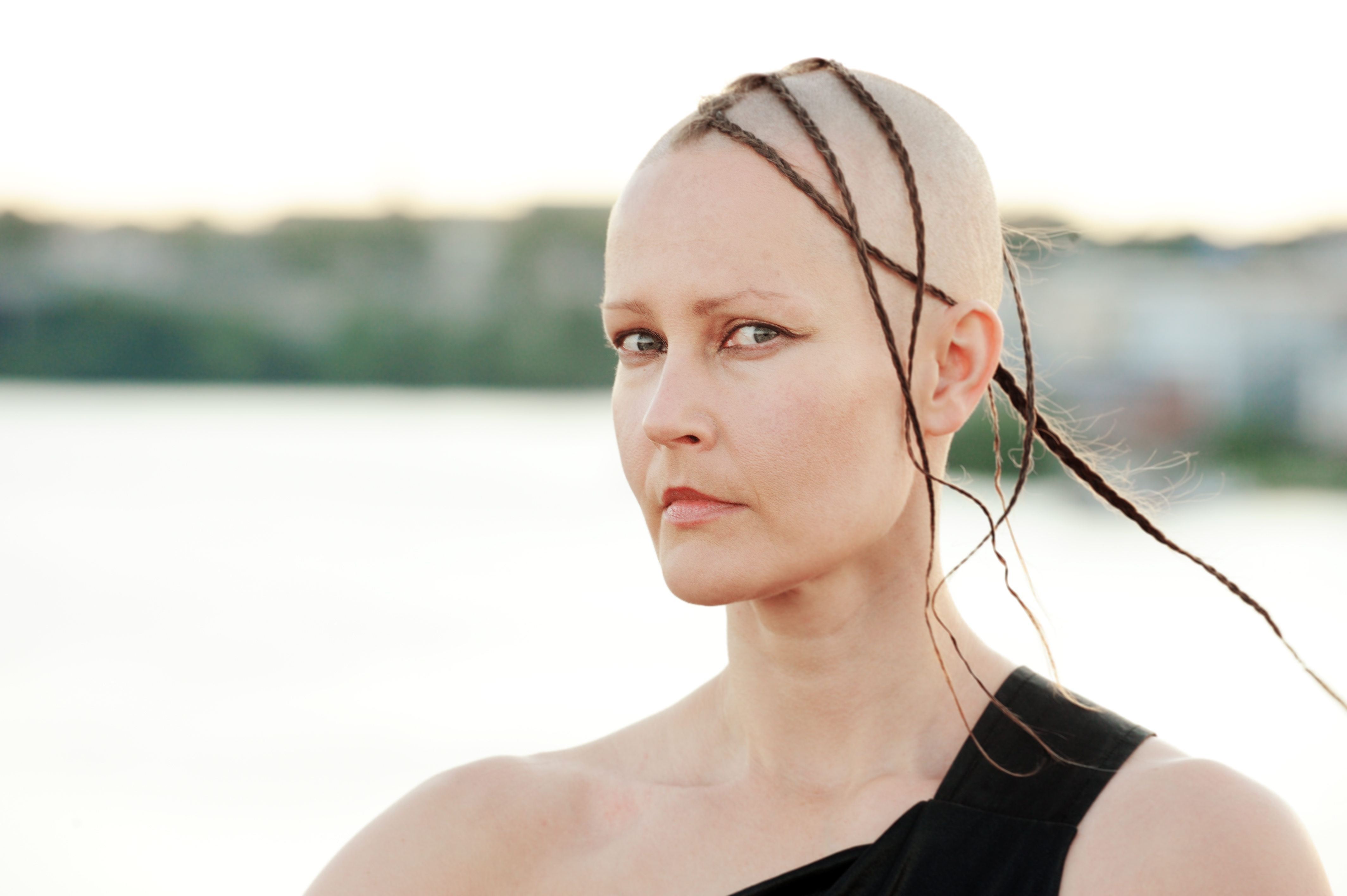 Porträtt Virpi Pahkinen av José Figueroa